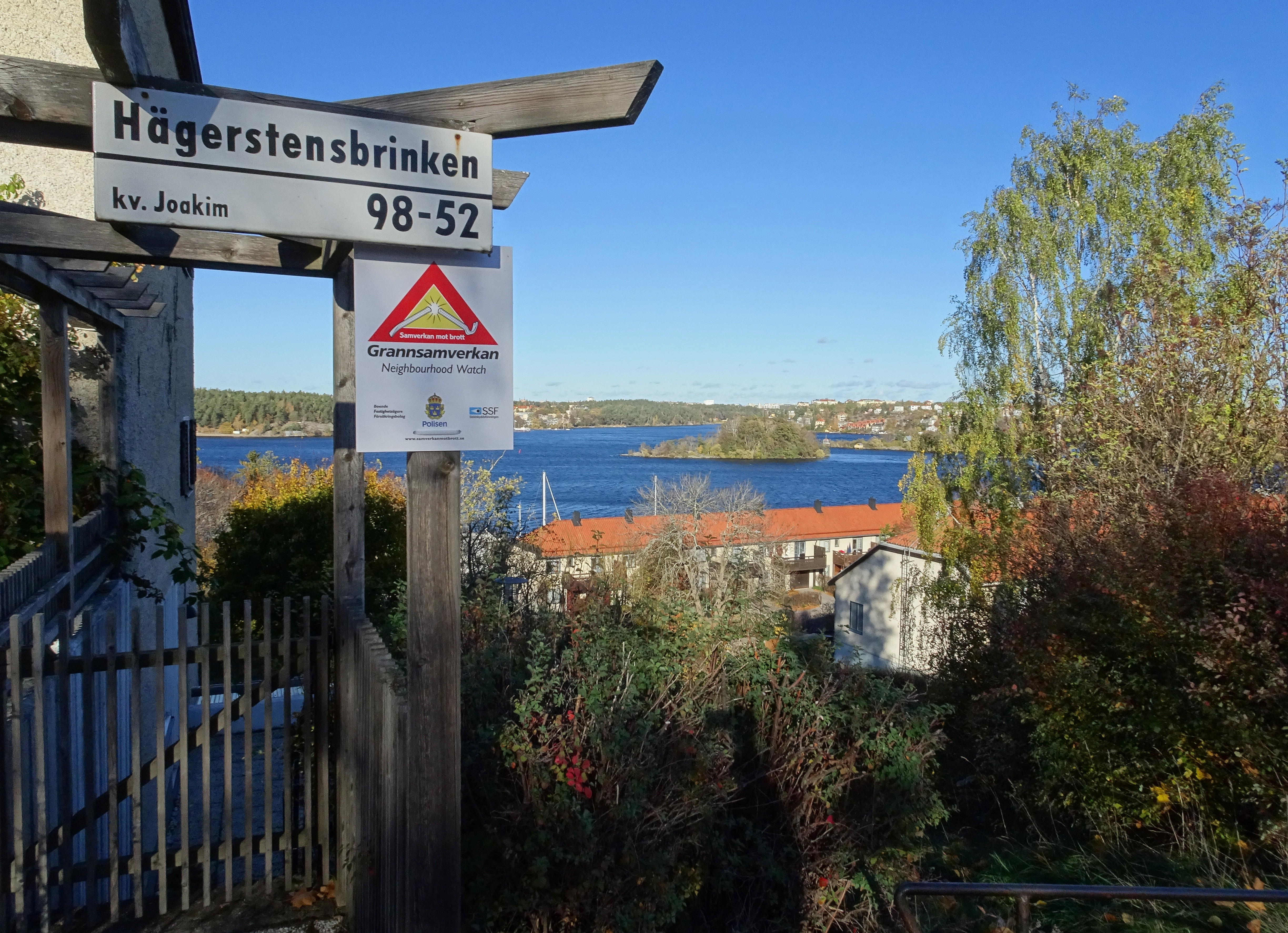 Hägerstensbrinken 52-98